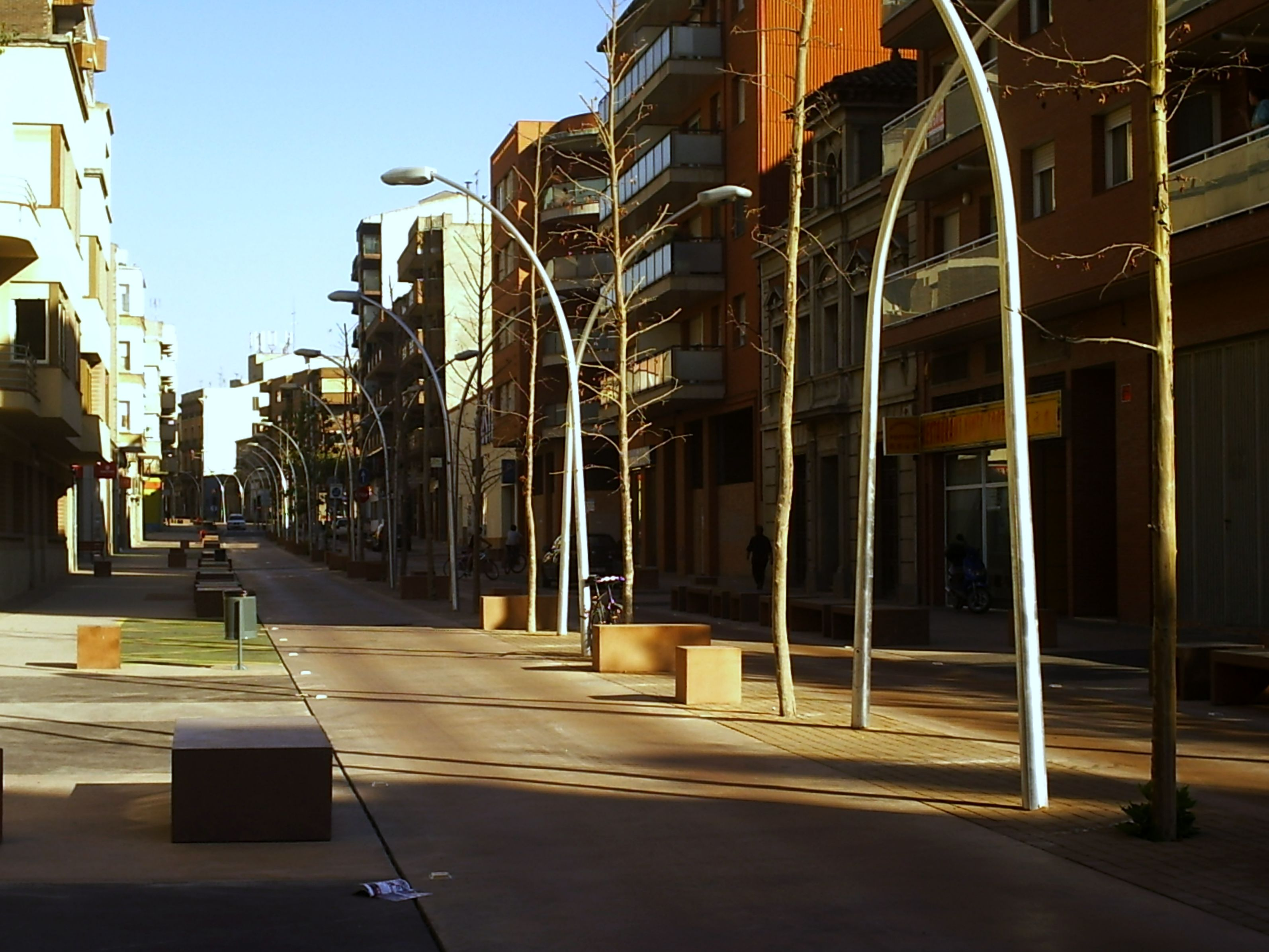 Parte de la nueva travesia ya reformada, relativa a la parte más occidental de la ciudad.